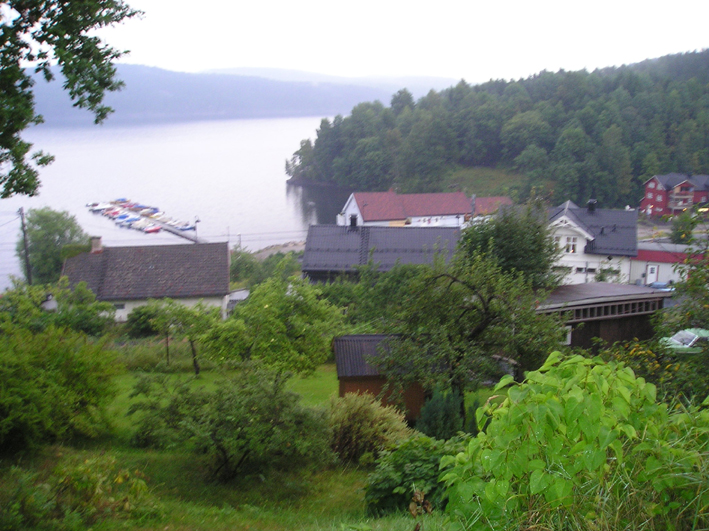 Foto: Hallvard Straume